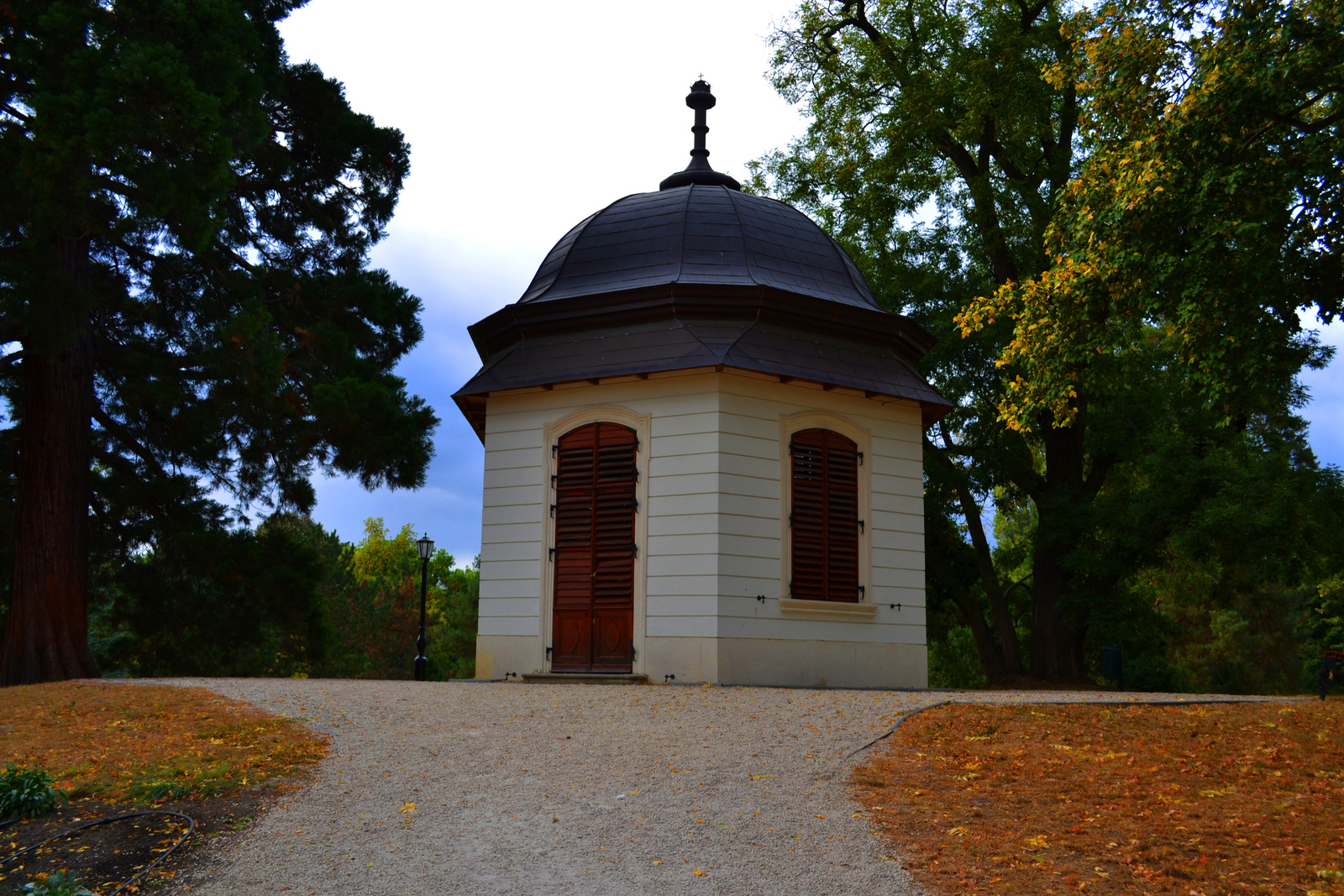 Grassalkovich-kastély kerti pavilonja (Gödöllő, Szabadság tér 1.)